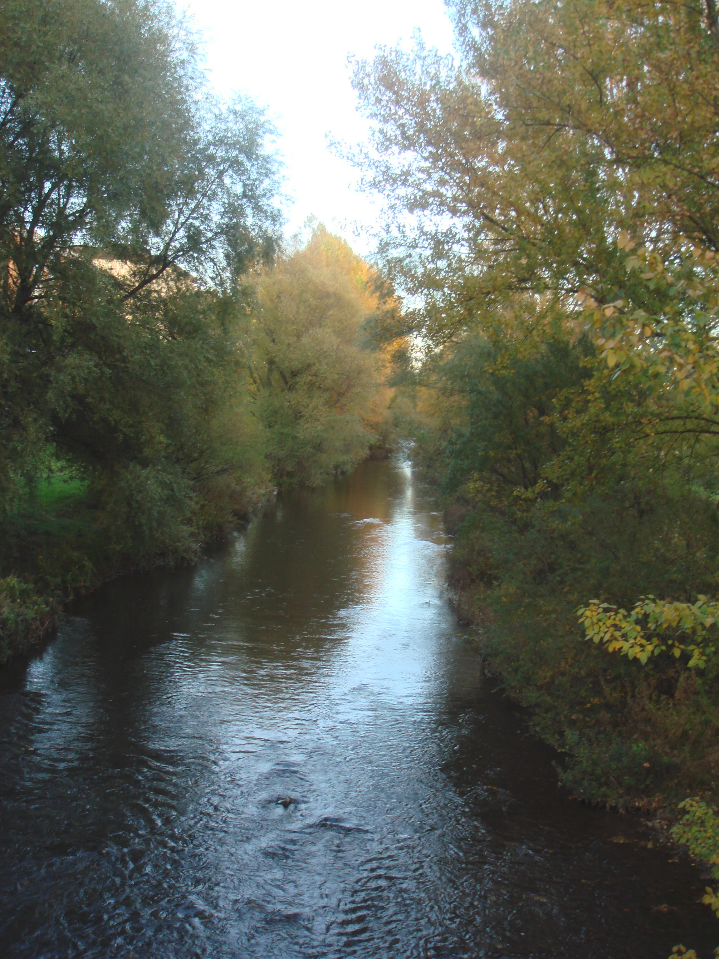 Río Arlanzón a su paso por Burgos, España.